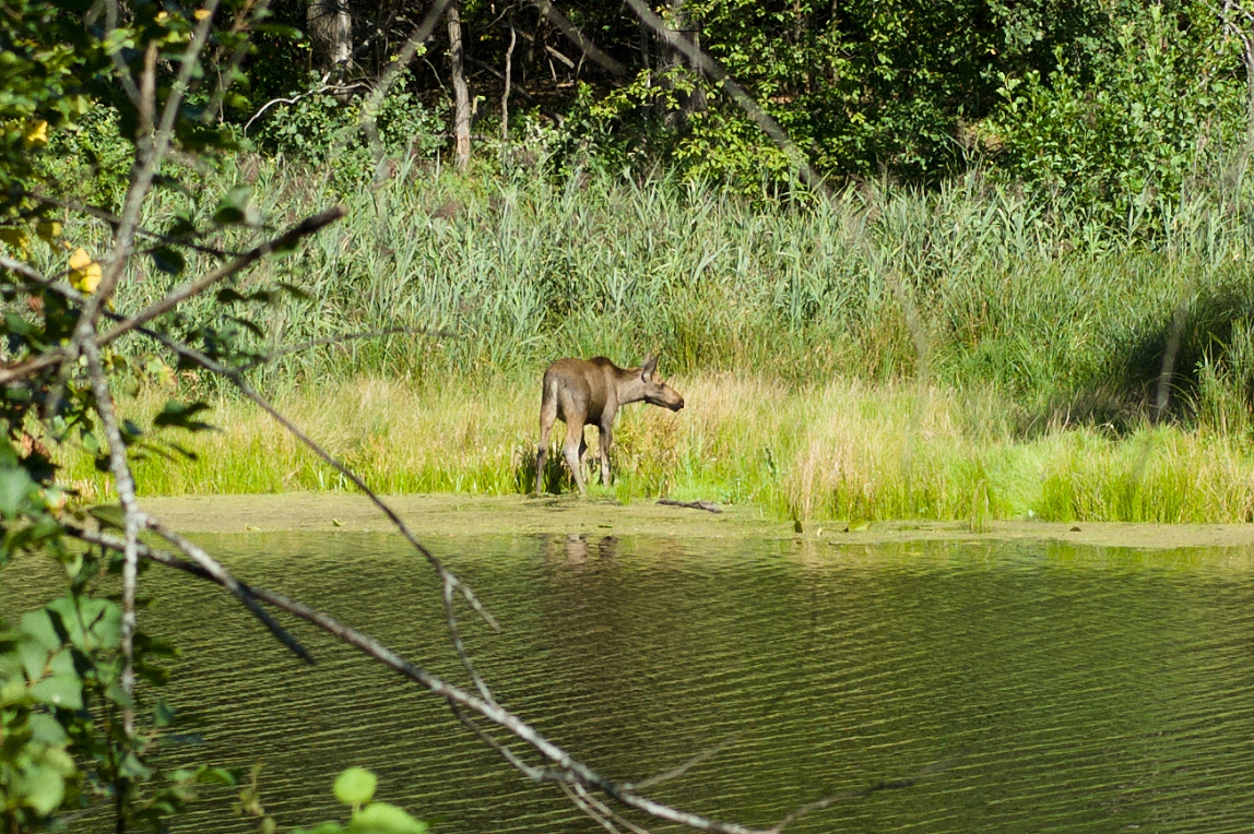 Лось на водопое на реке Виша